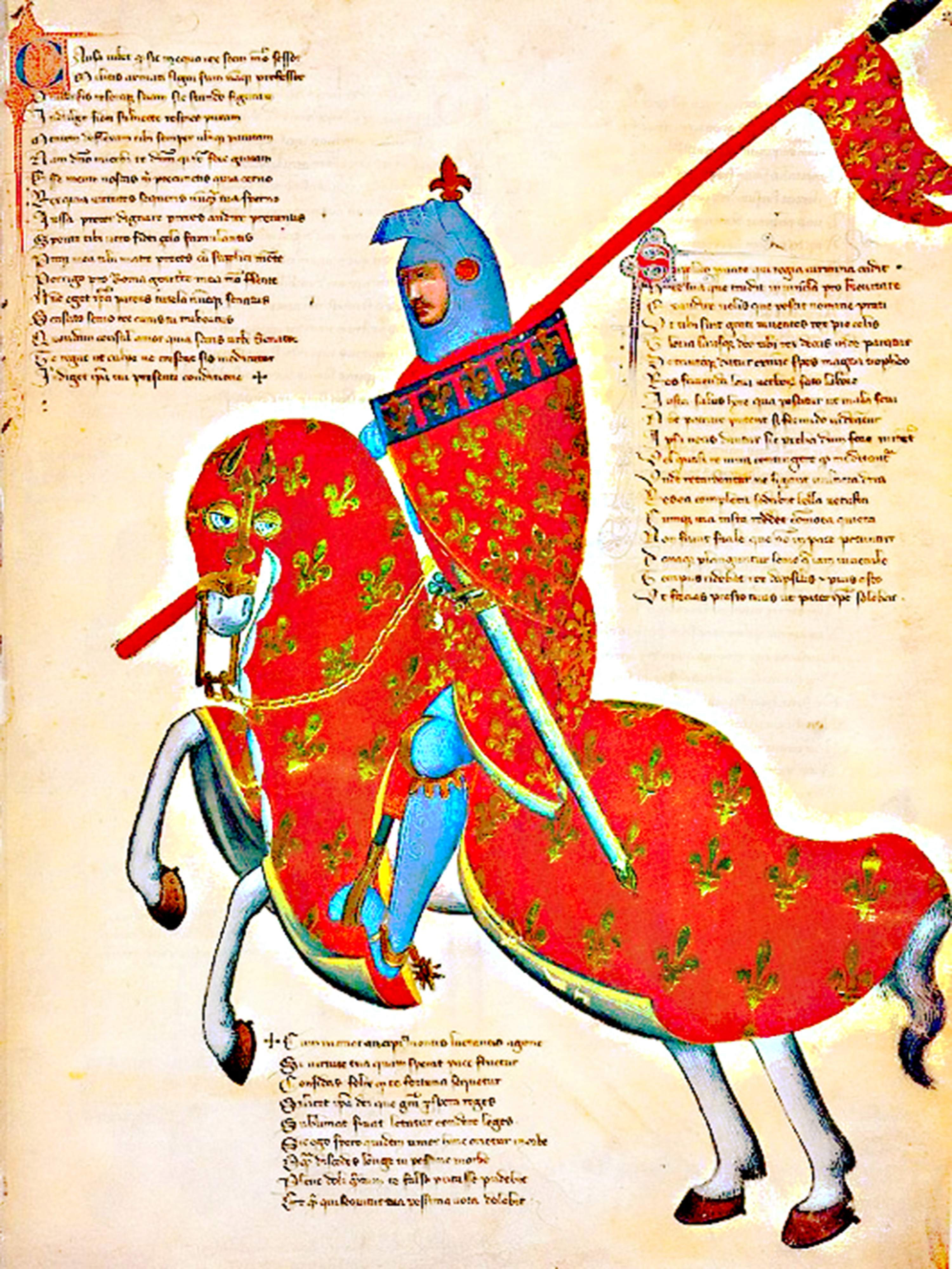 Robert d'Anjou, comte de Provence et roi de Naples